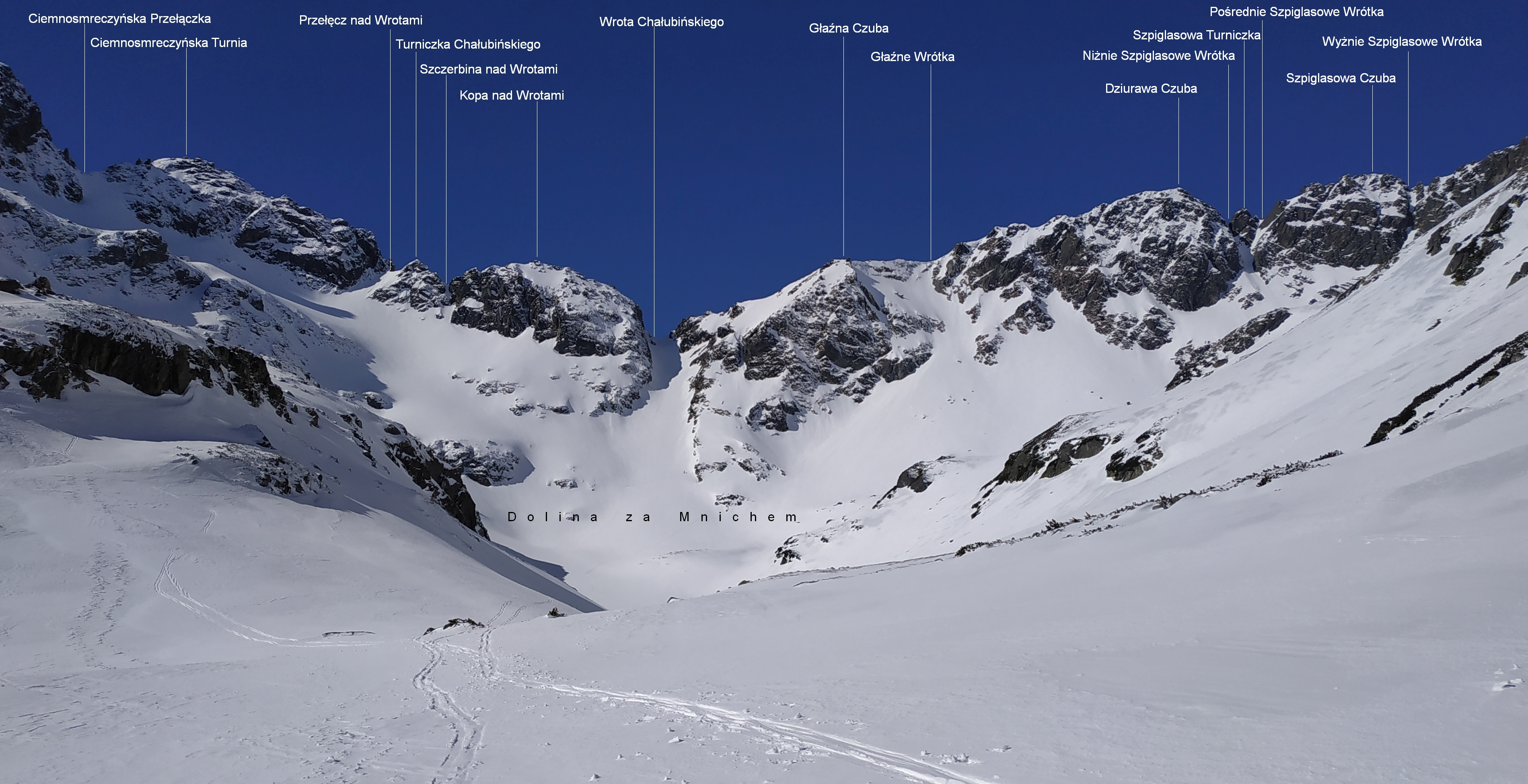 Główna grań nad Doliną za Mnichem